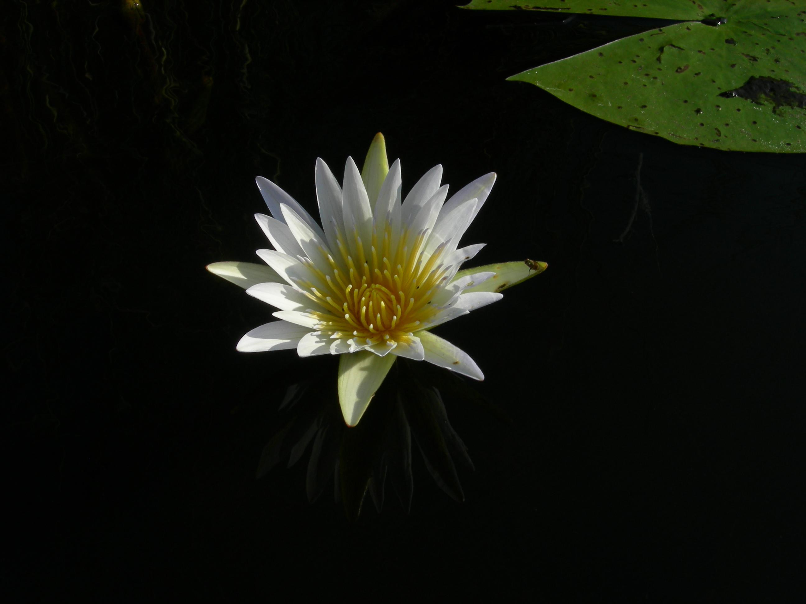 Okavango Delta, Botswana